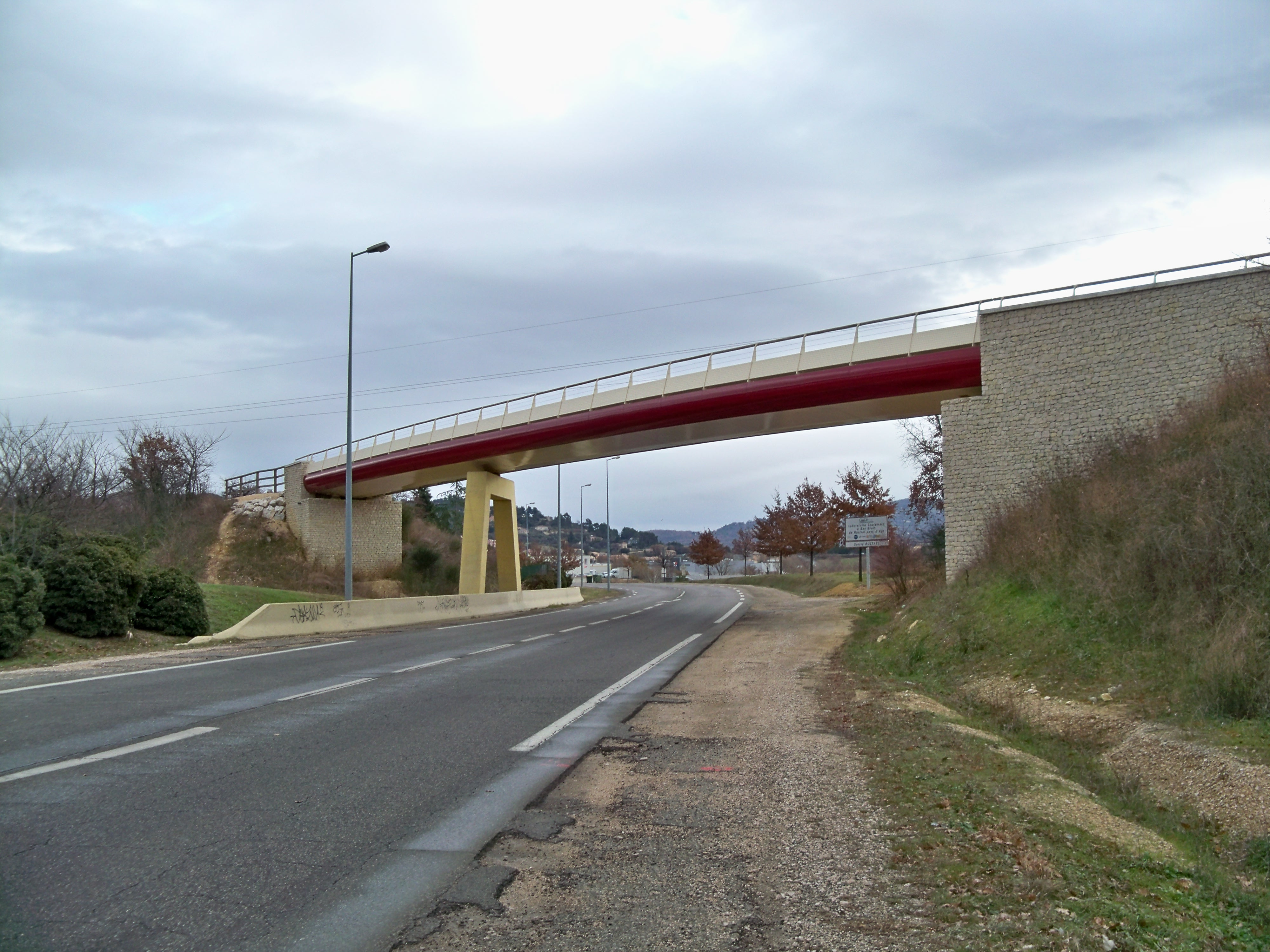 Pont du véloroute, près du hameau des Chênes, commune d'Apt, France